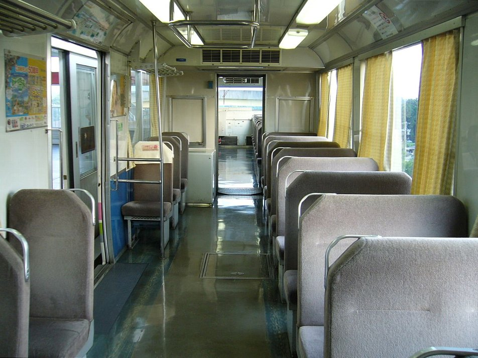 桃花台新交通桃花台線100系電車の車内 桃花台東駅に停車中の134号から後方を望む 後部窓越しにループ線が見える 2006年9月15日 Bakkai撮影